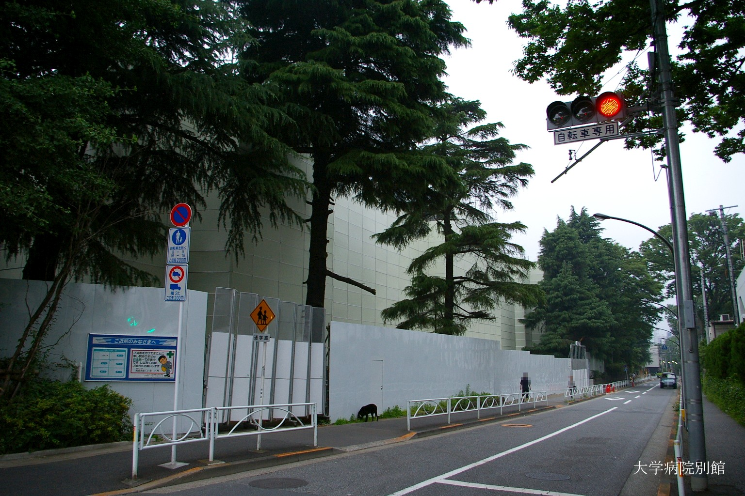 2009年4月東京都下で塾生 (talk)が撮影